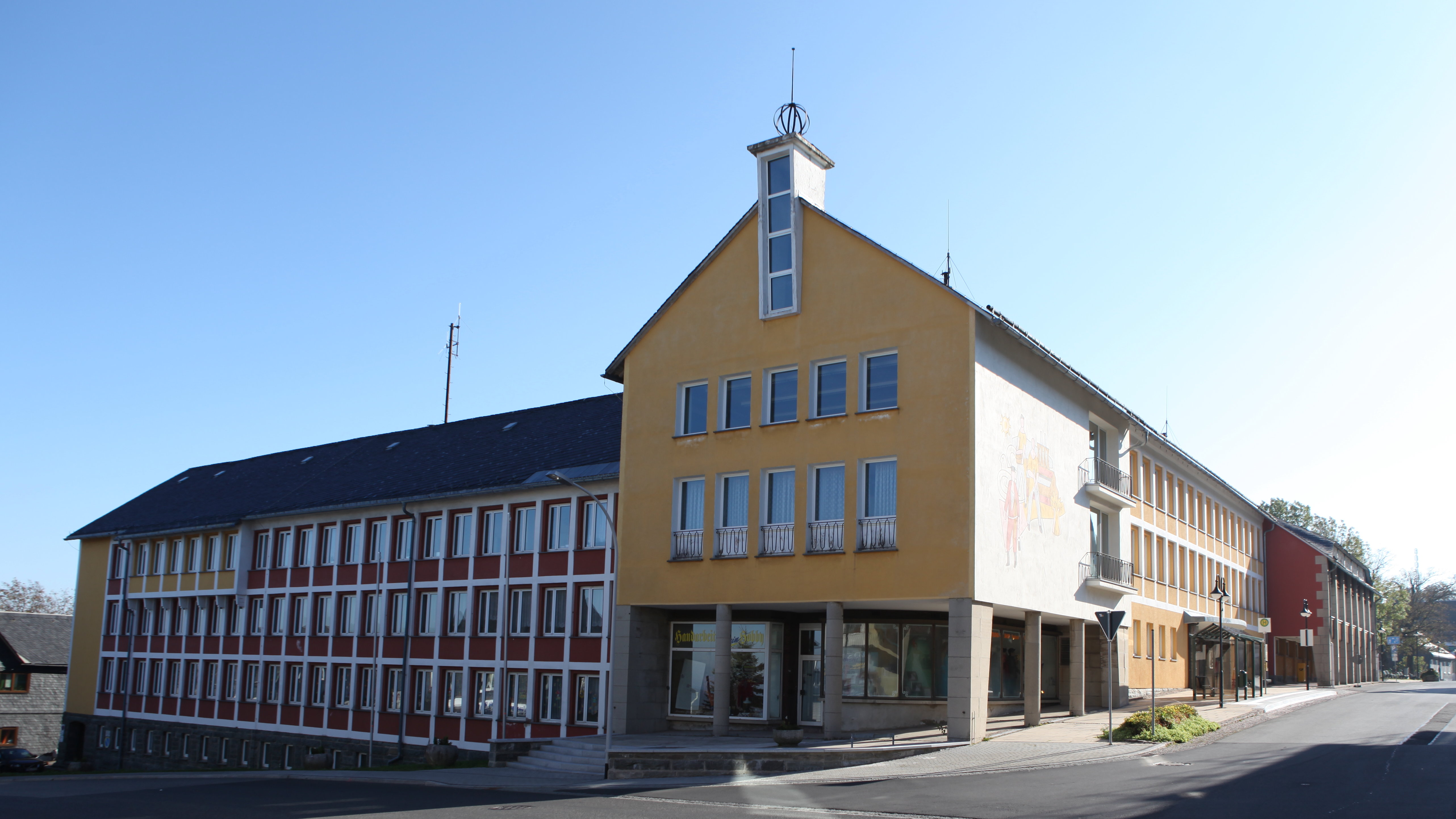 Ehem. Verwaltungsgebäude des Rates des Kreises Neuhaus am Rennweg, 1958-61, Herbert Fleischhauer, Neuhaus am Rennweg, Sonneberger Straße 1